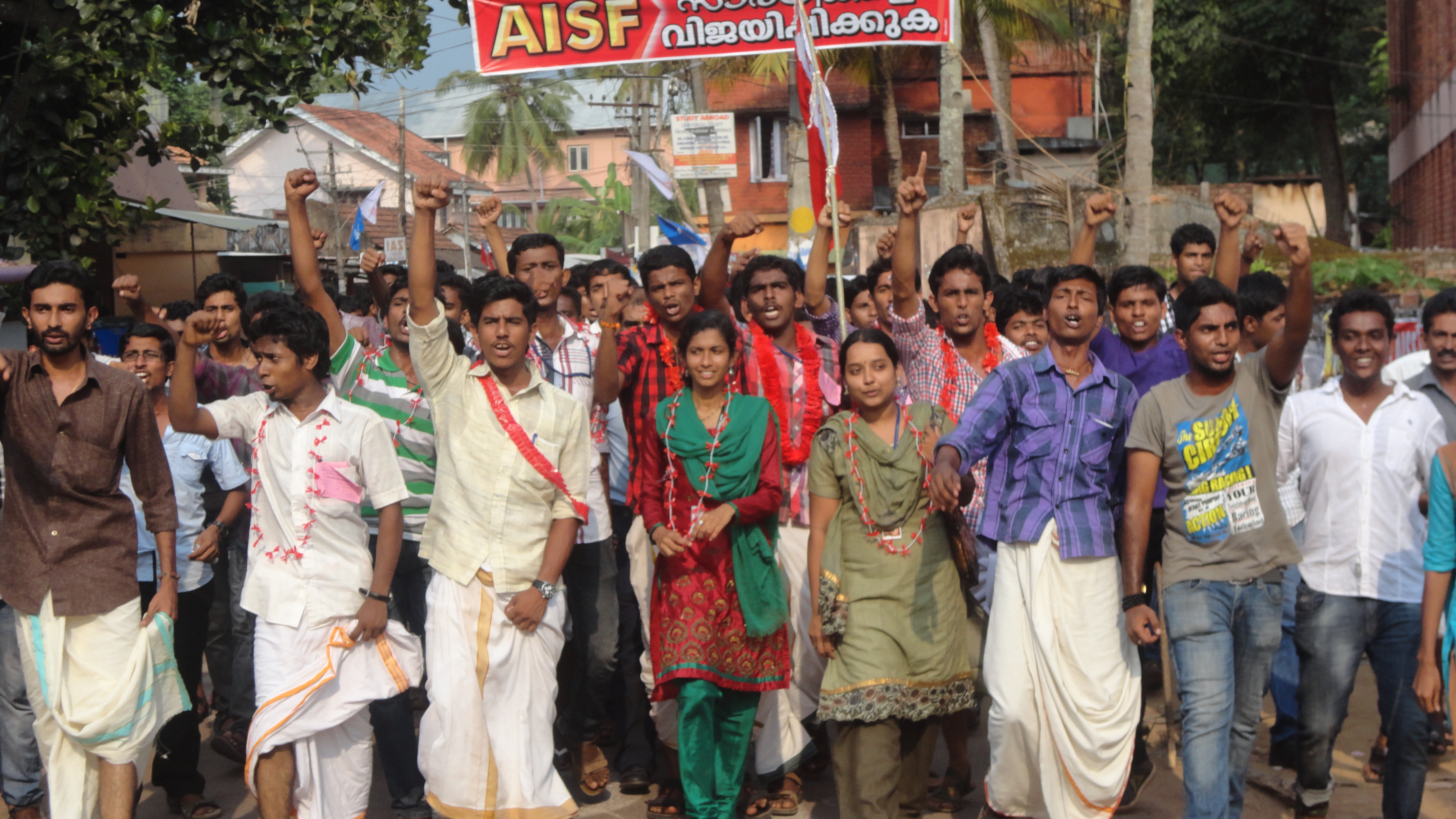 കോളേജ് യൂണിയൻ ഭരണം നേടിയെടുത്ത എ ഐ എസ് എഫ് പ്രവർത്തകരുടെ ആഹ്ലാദ പ്രകടനം